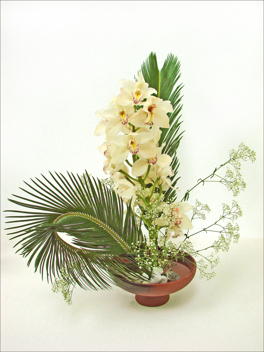 Ikebana, ansehnliches Beispiel